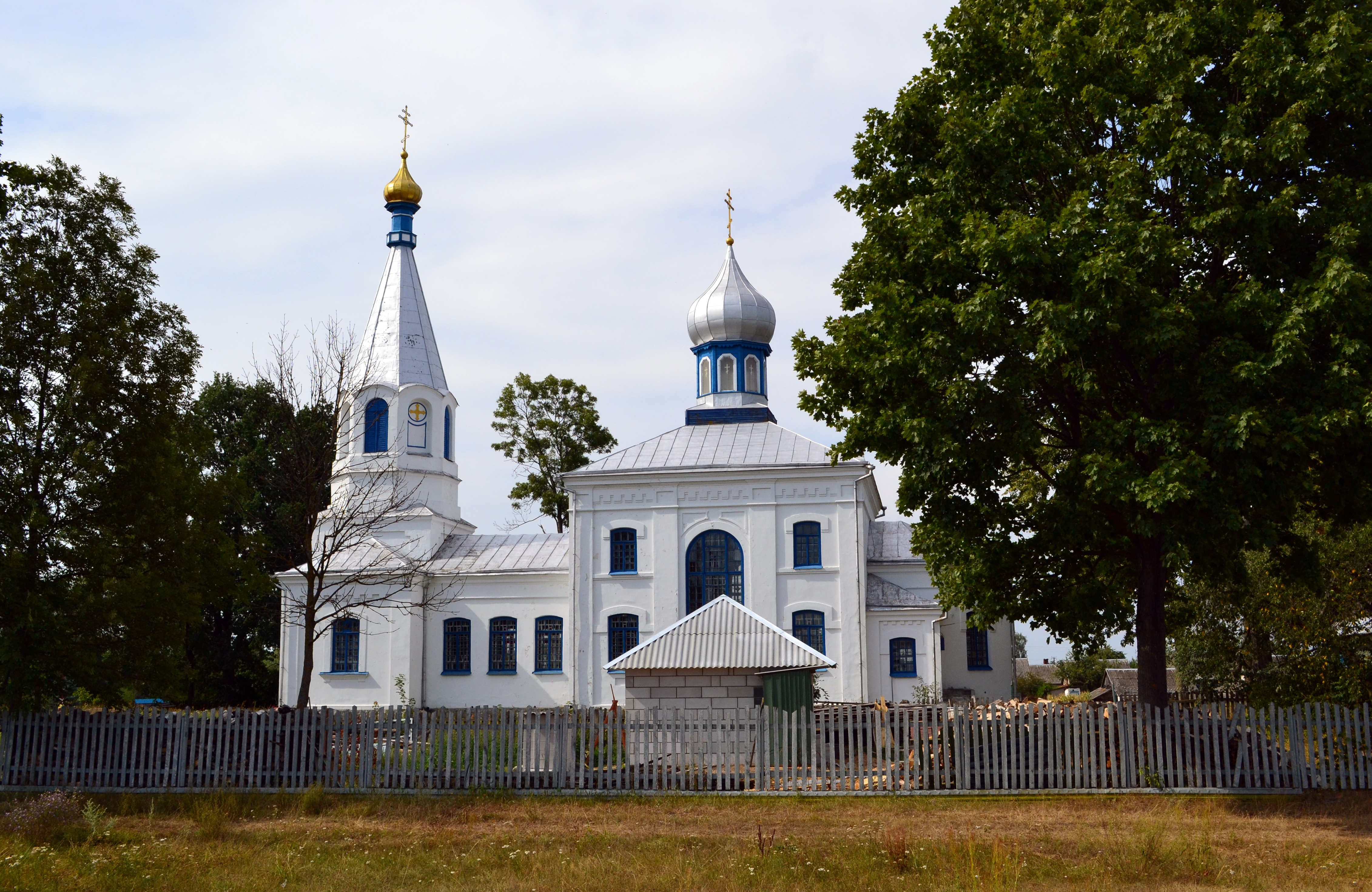 Беларуская (тарашкевіца): Крыжаўзьвіжанская царква (Аранчыцы) This is a photo of Belarusian heritage monument. Reference number: 113Г000593 ( WLM)